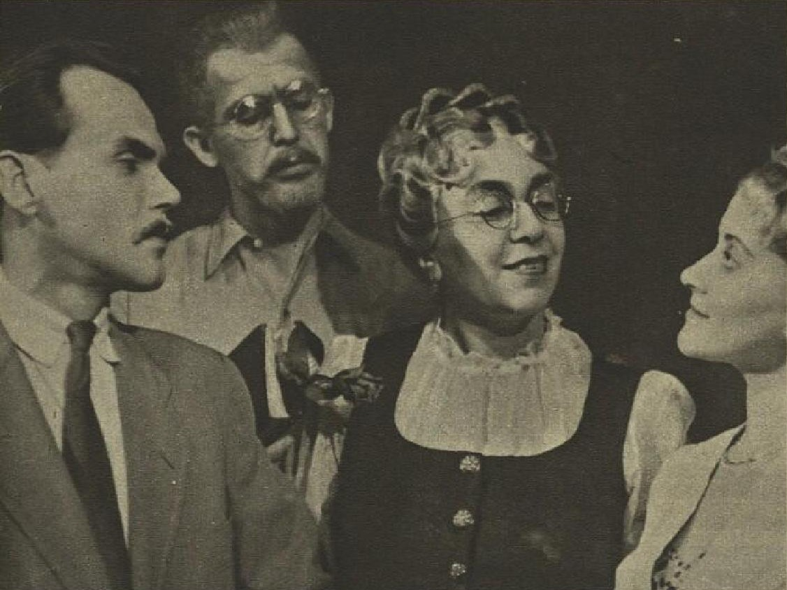 Josef Chvalina (1920-1982), český herec